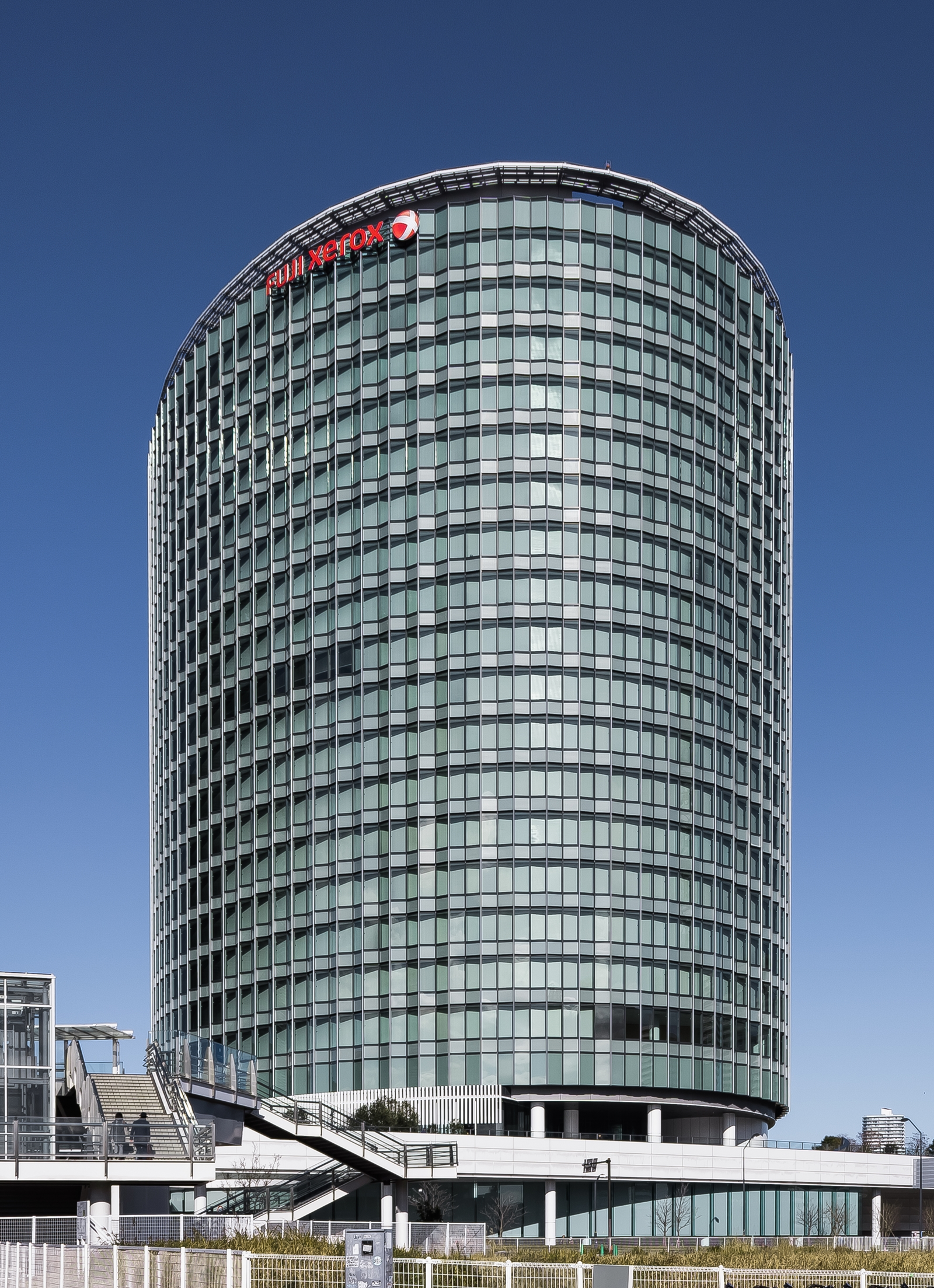 富士ゼロックスR&Dスクエア（神奈川県横浜市西区）